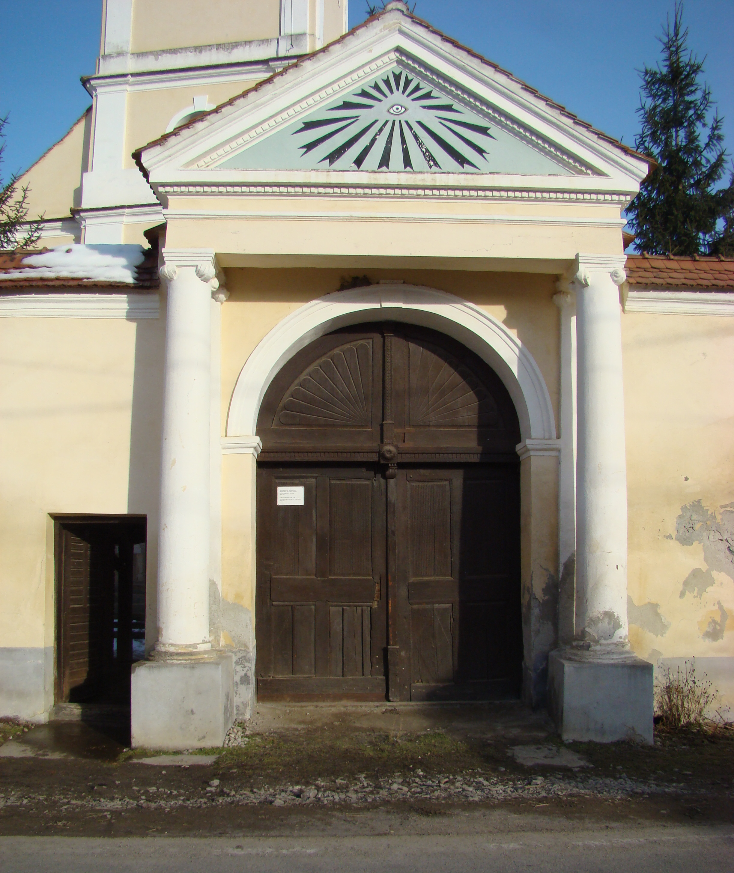 Ansamblul bisericii evanghelice fortificate, sat Zagăr; comuna Zagăr